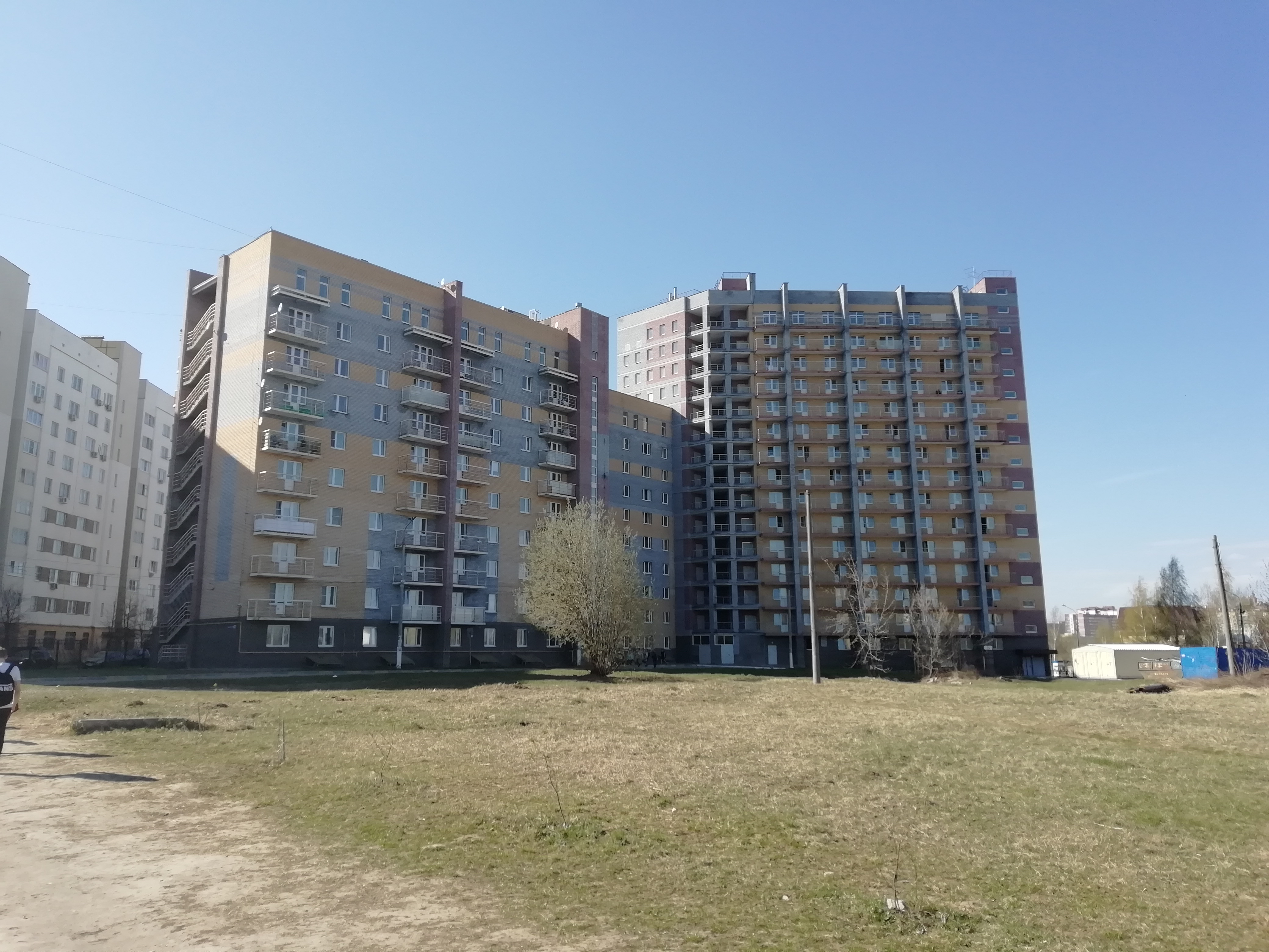 Здания 5-го и 6-го общежитий Нижегородского государственного технического университета